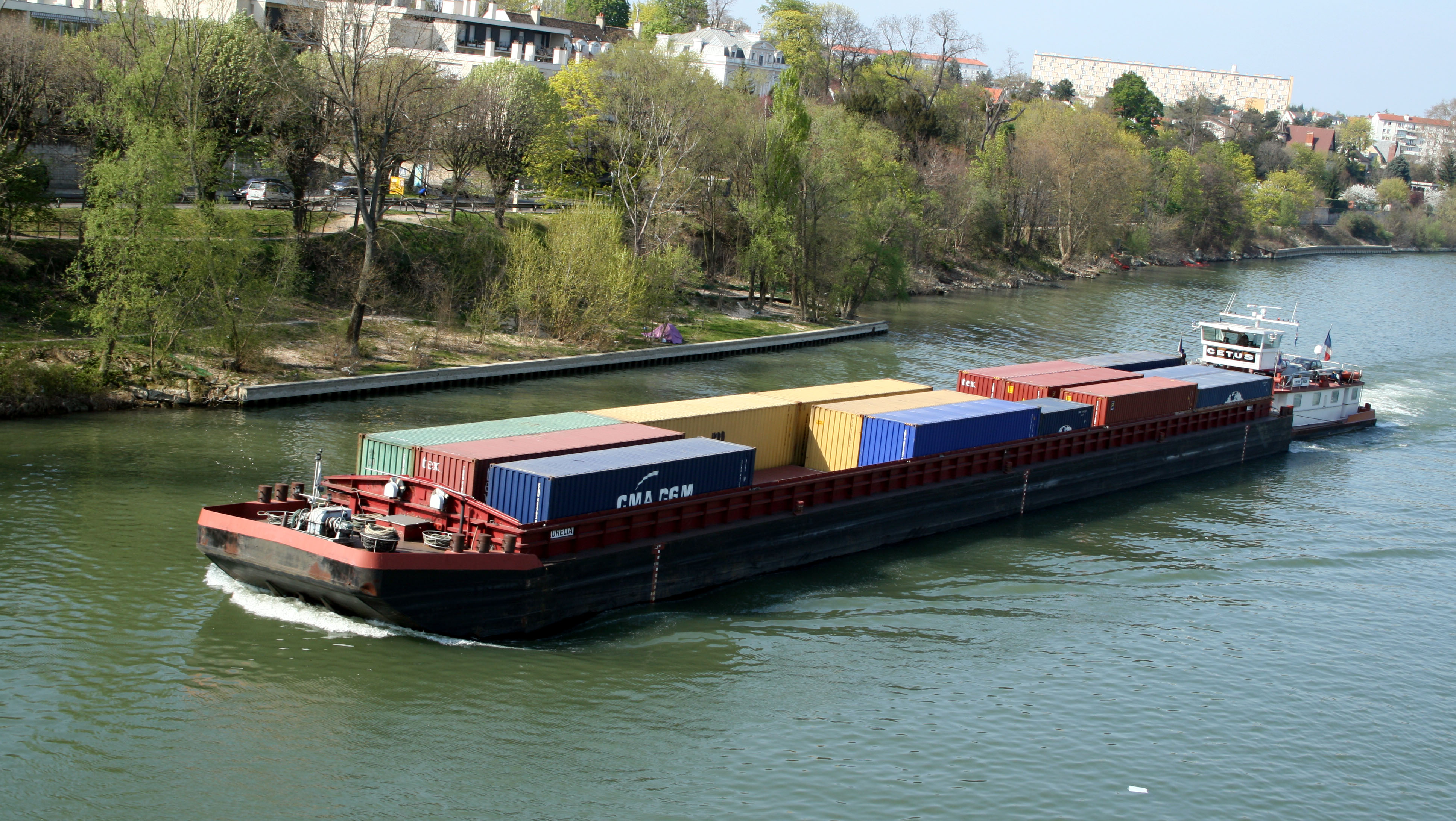 Pousseur Cetus et barge porte contenneur sur la Seine